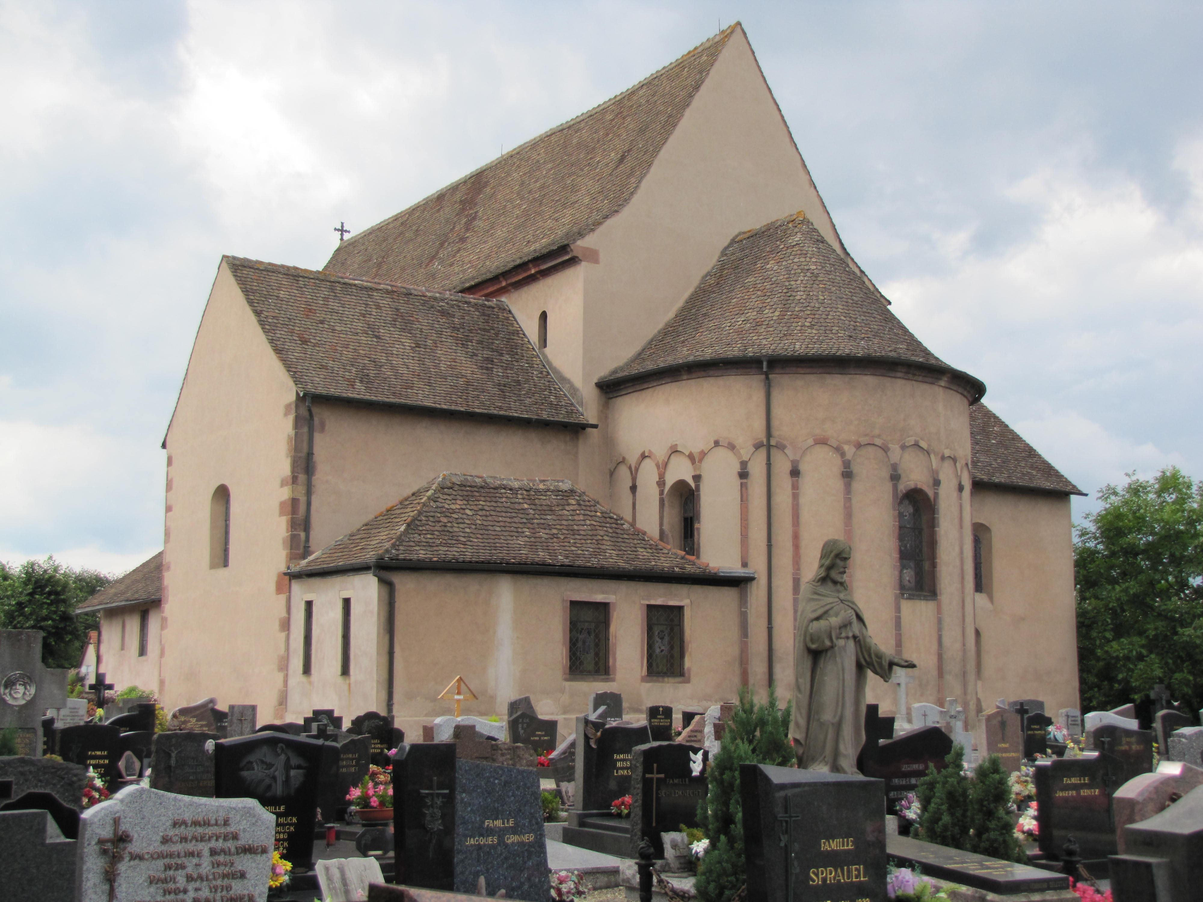 Alsace, Bas-Rhin, Église Saint-Trophime d'Eschau (PA00084707, IA00023089).